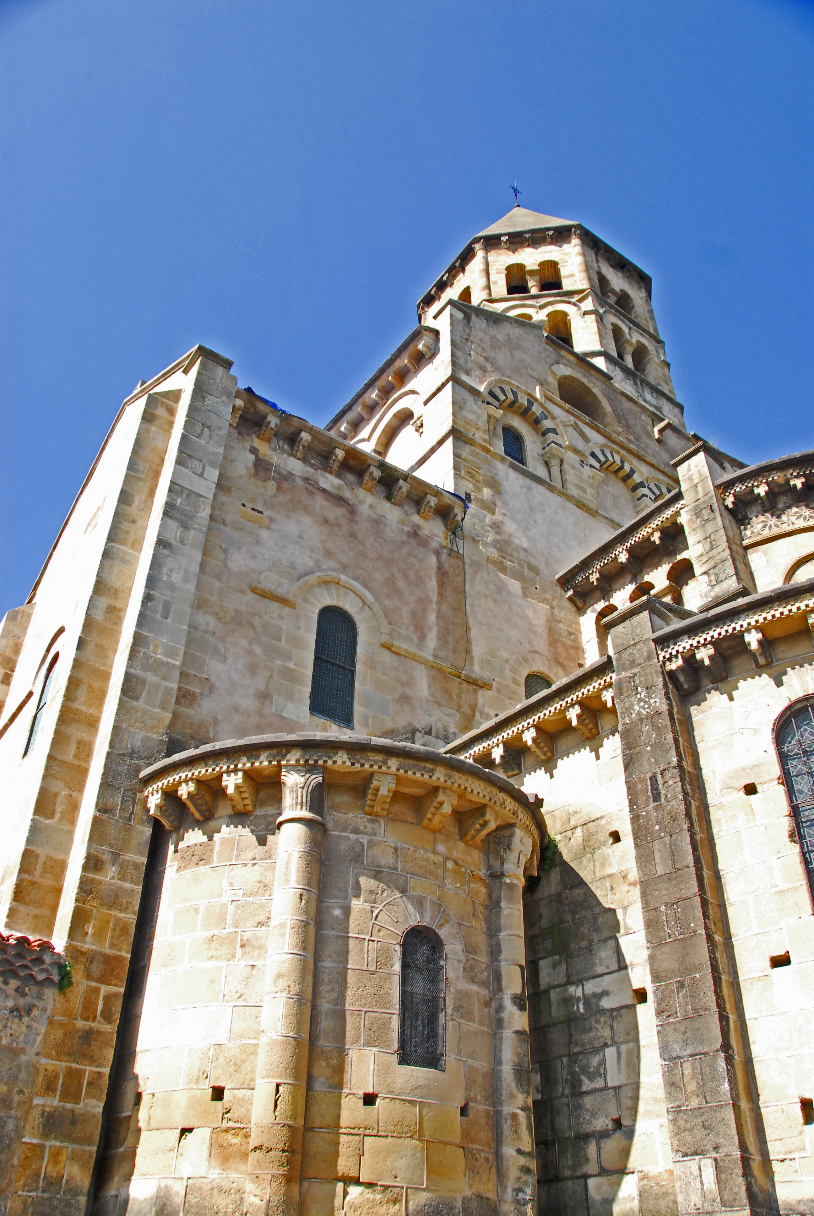 St-Saturnin Puy-de-Dôme), Chorhaupt von SO